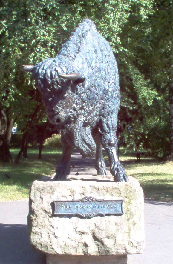 European bison Pomnik "Żubra Puszczy Imperatora" w hajnowskim parku. 2005 by Jurij